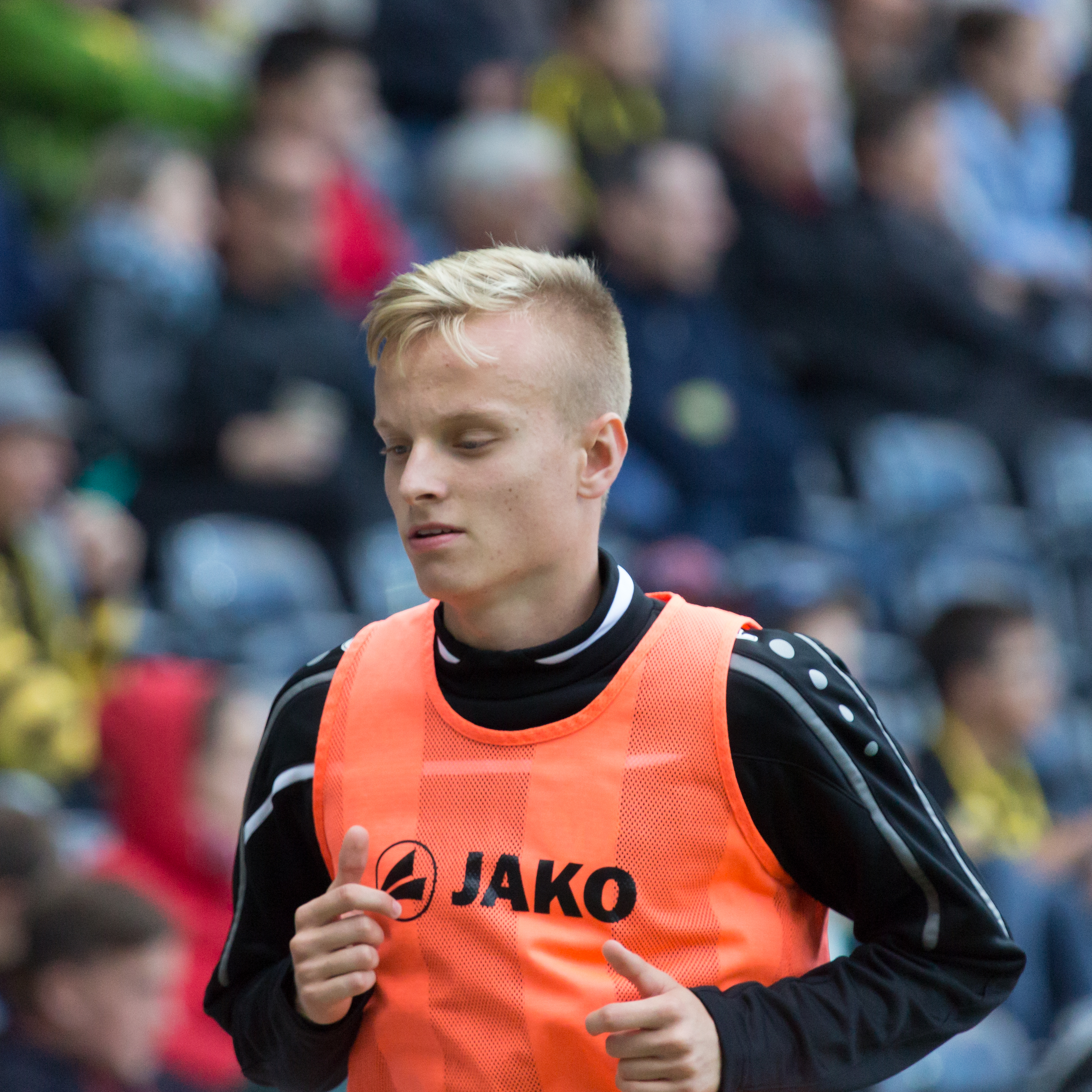 Florent Hadergjonaj beim Spiel des BSC Young Boys gegen den FC Luzern